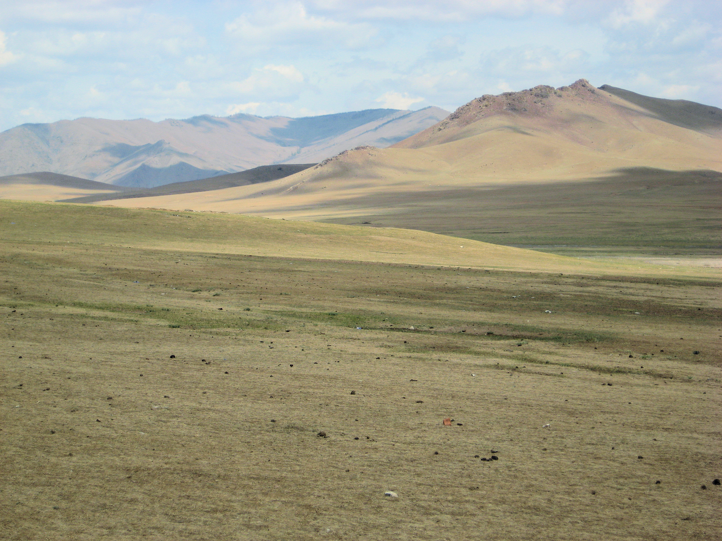 Mongolian steppes